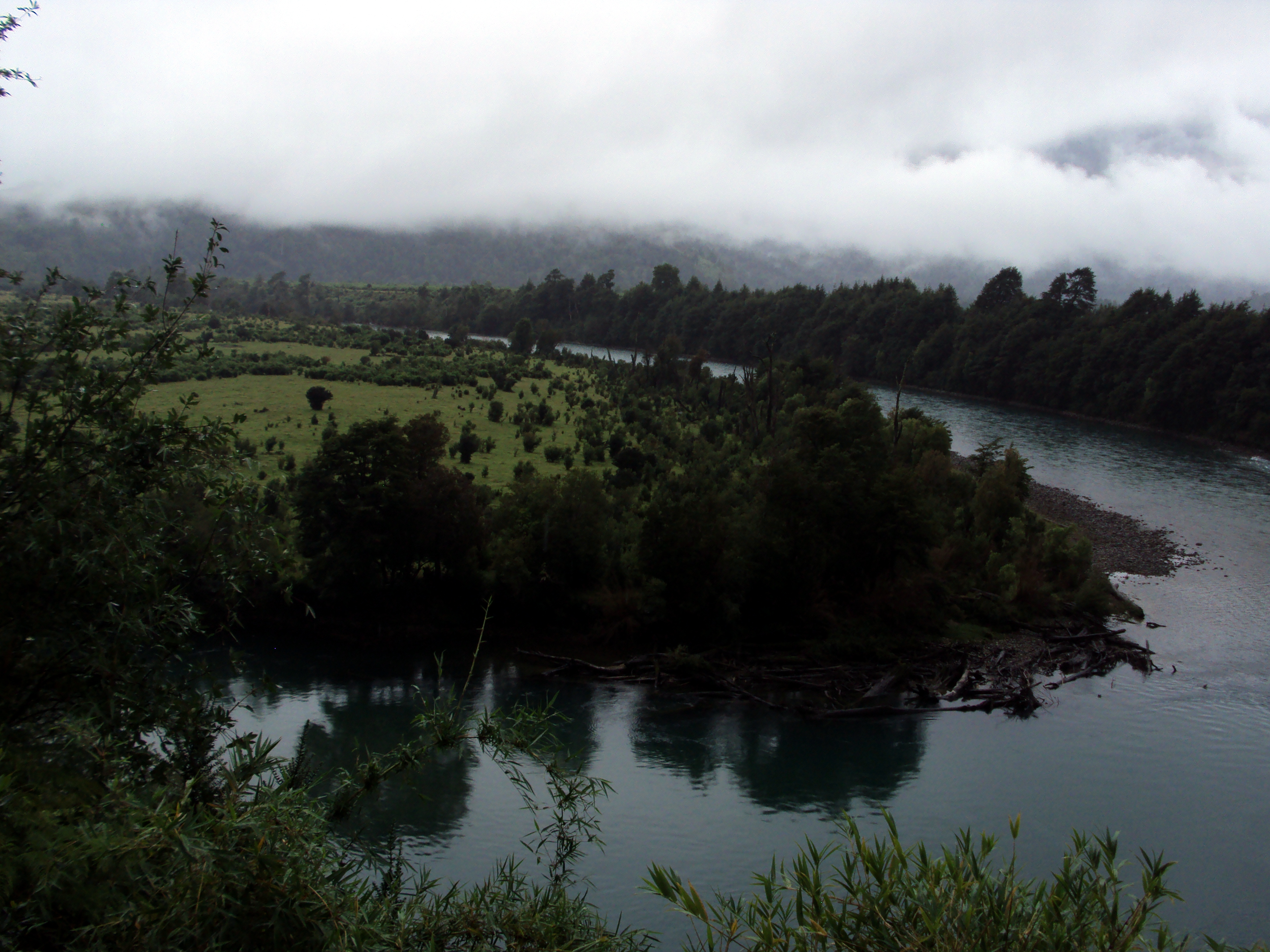 Curva del río Rosselot, cerca de su desembocadura, comuna de Cisnes, Aysén, Chile.